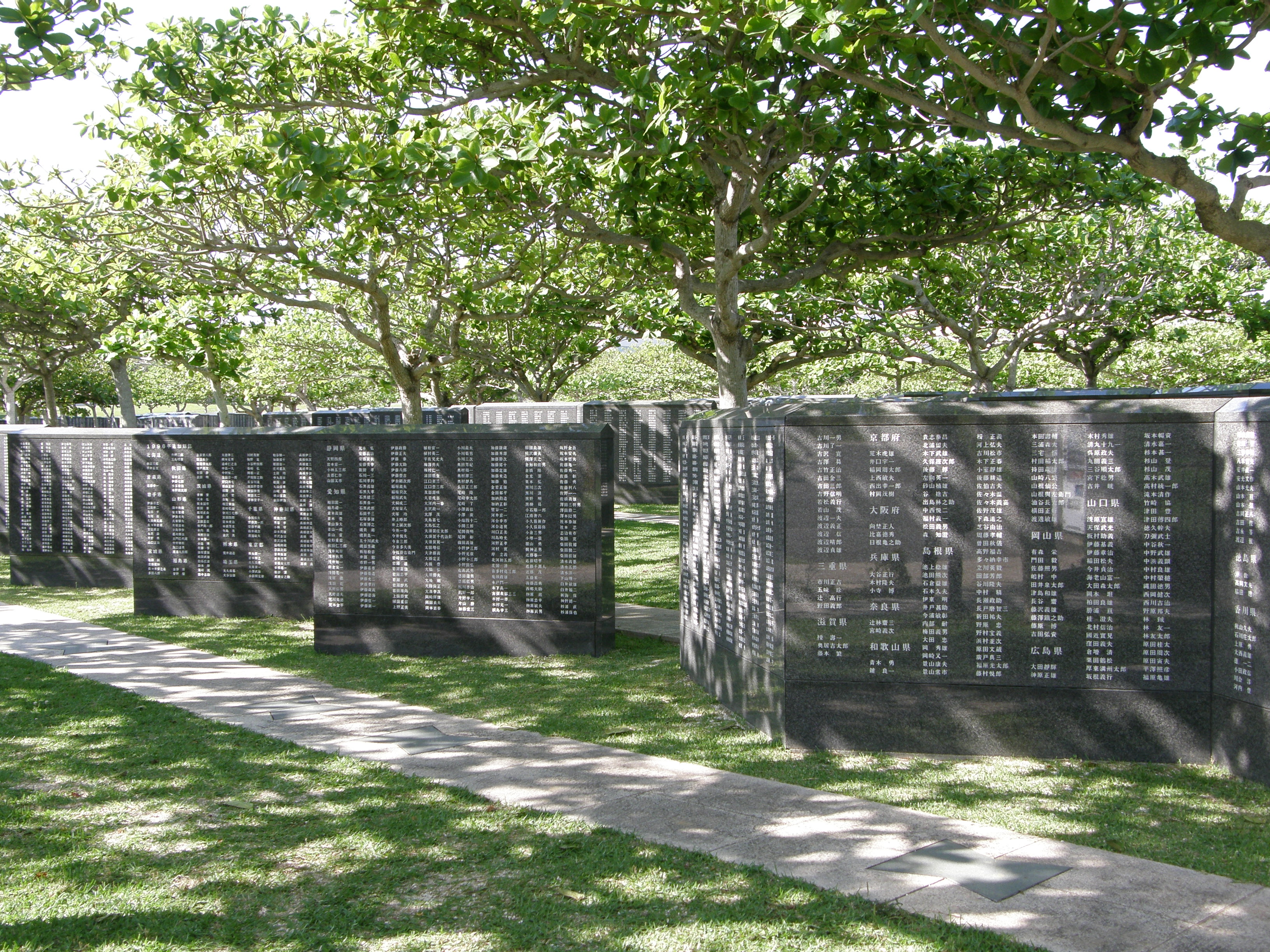 平和の礎（2017）